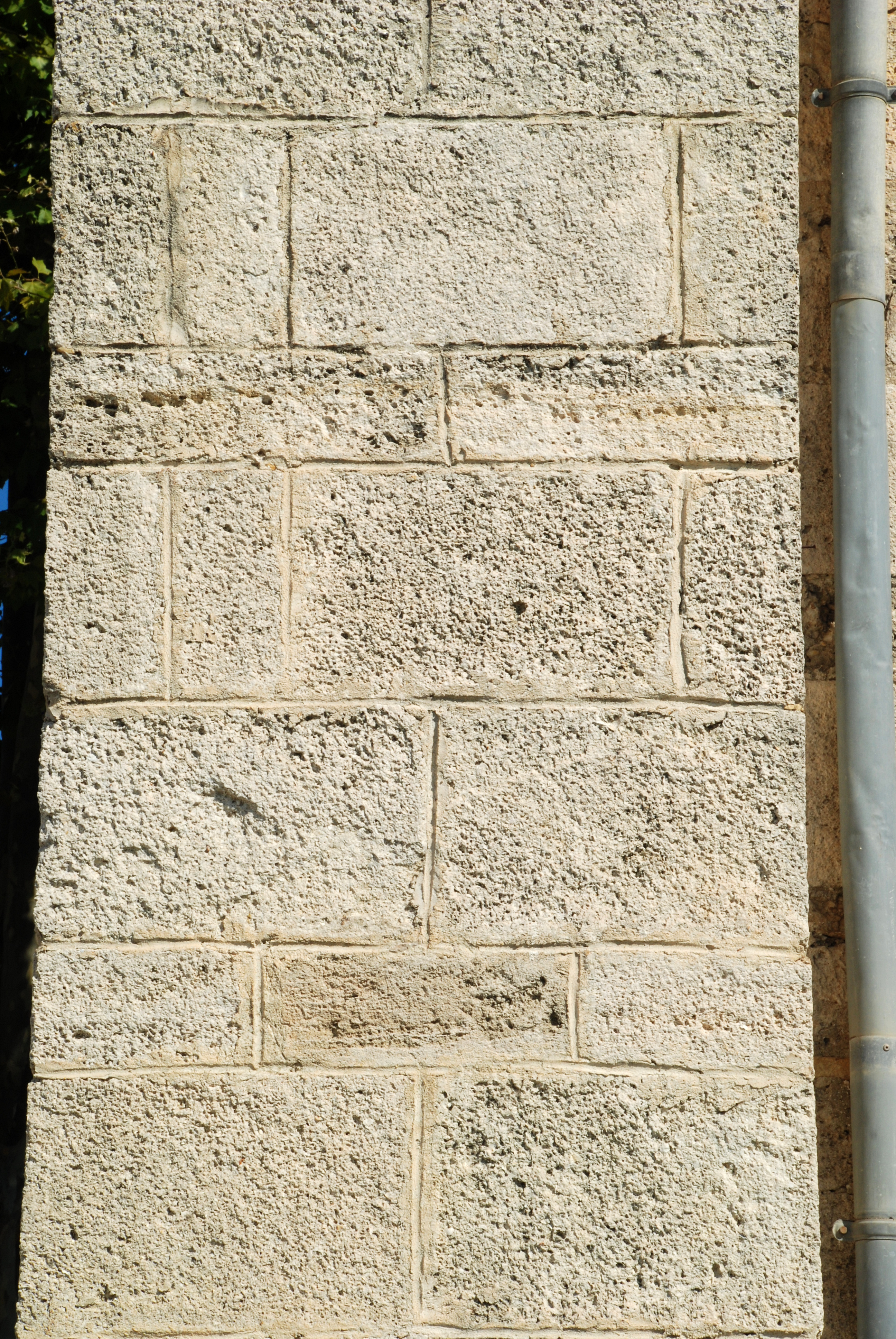 France - Languedoc - Hérault - Église Saint-Laurent de Lattes